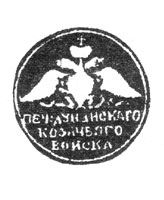 Печатка Дунайського козацького війська 1851 р.